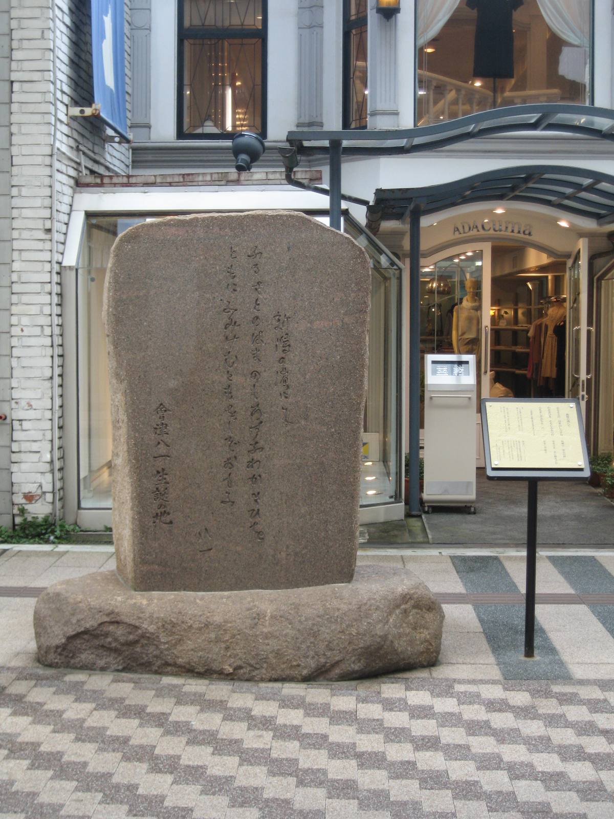 新潟市中央区古町通5番町にある、会津八一の石碑。